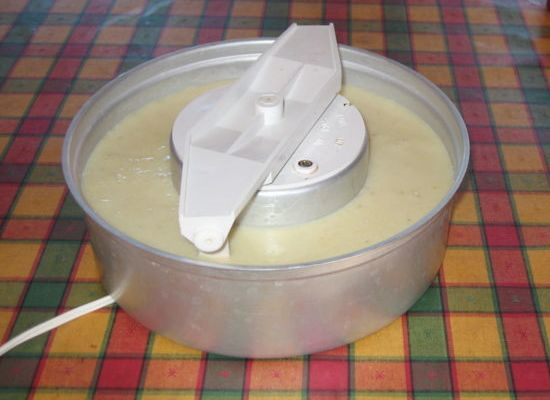 Photographie de ma sorbetière autonome.